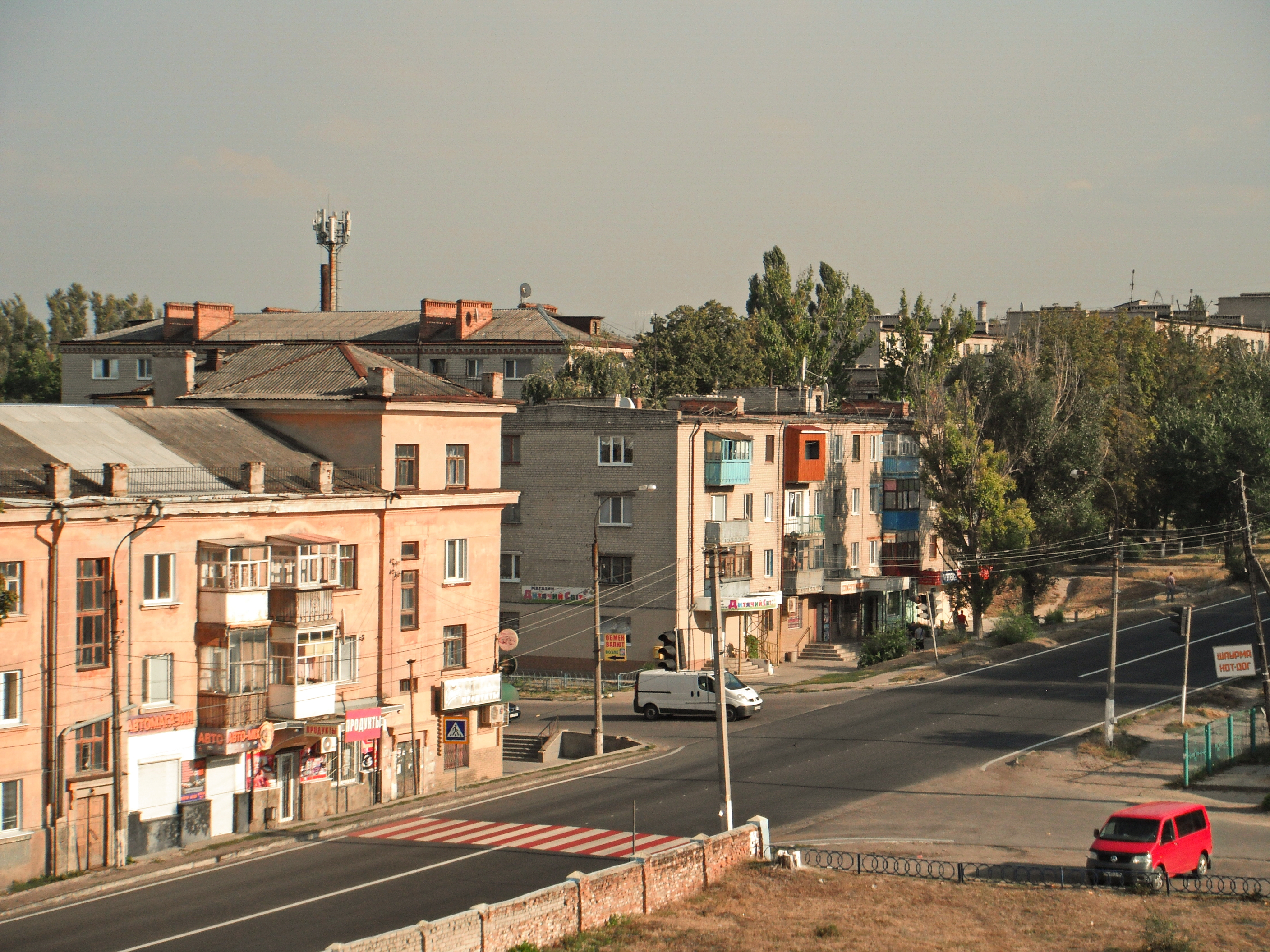 Старопоштова вулиця в місті Ізюм. 2017 рік.